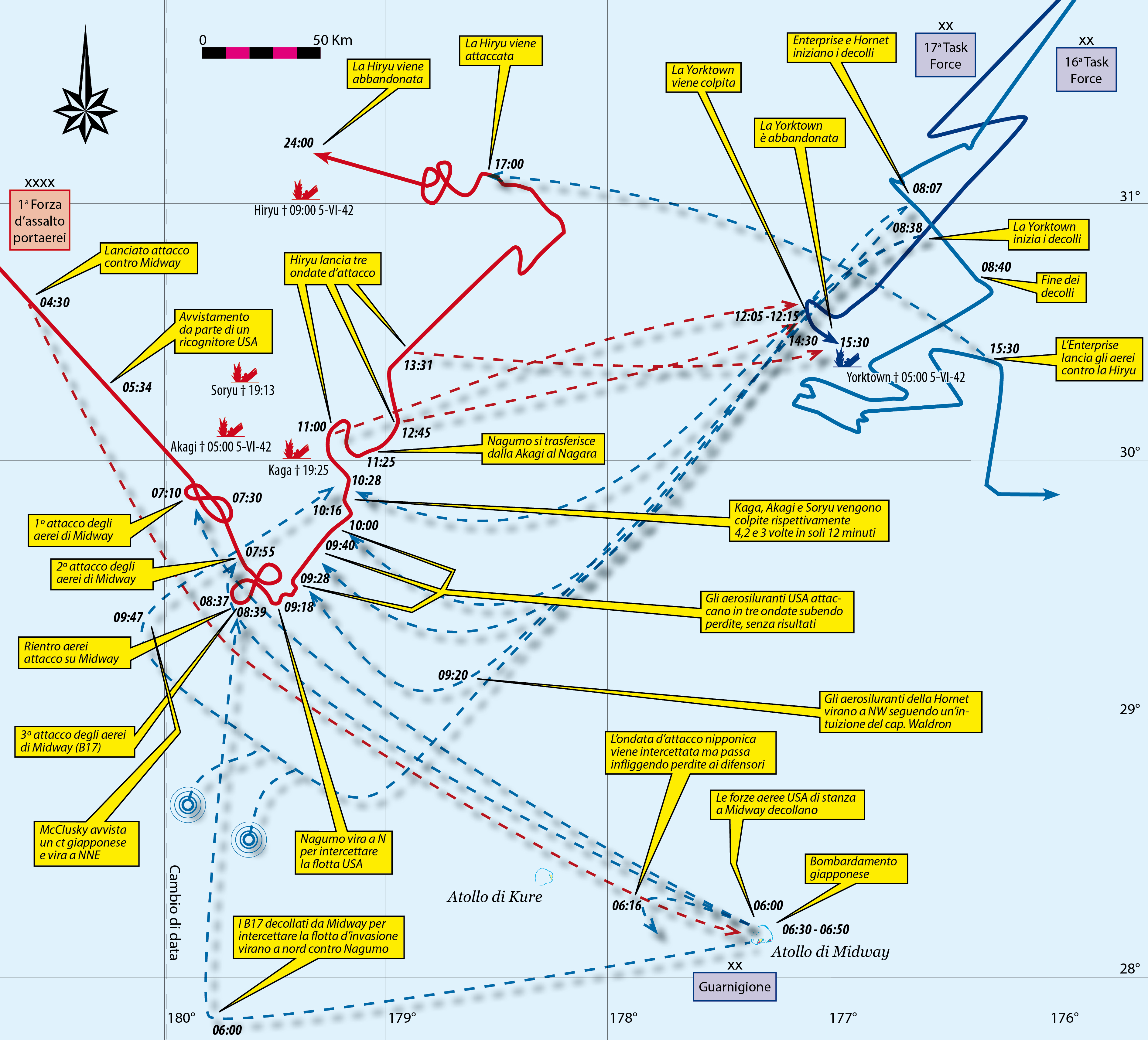 Cartina della battaglia di Midway - episodi del 4 giugno 1942